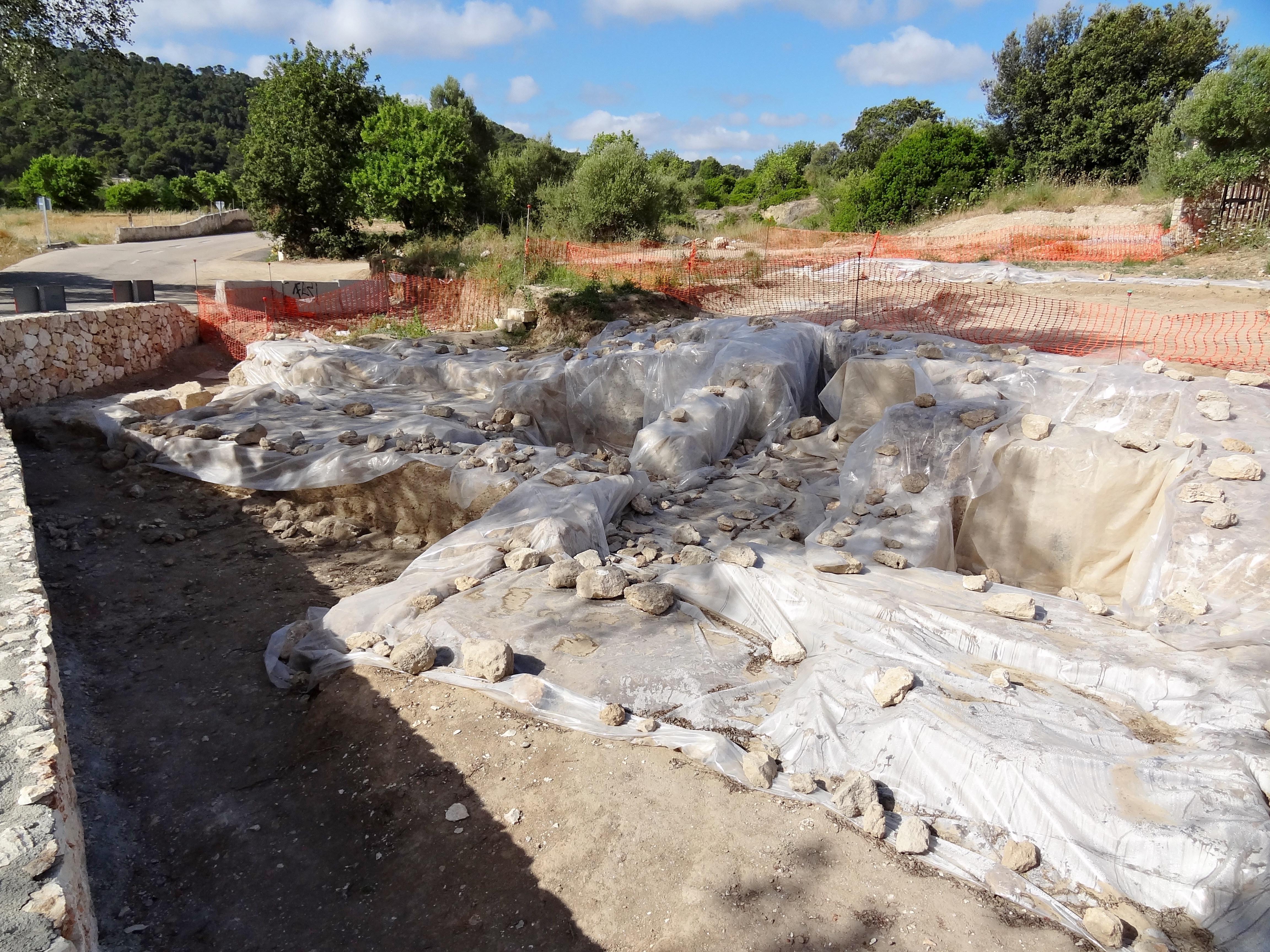 Ausgrabungsstätte an der Landstraße MA-4034 am Landgut Son Sard in der Gemeinde Son Servera, Mallorca, Spanien